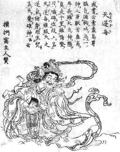 Amanozako (天逆毎, a monstrous goddess mentioned in the Kujiki) from the Konjaku Gazu Zoku Hyakki (今昔画図続百鬼)